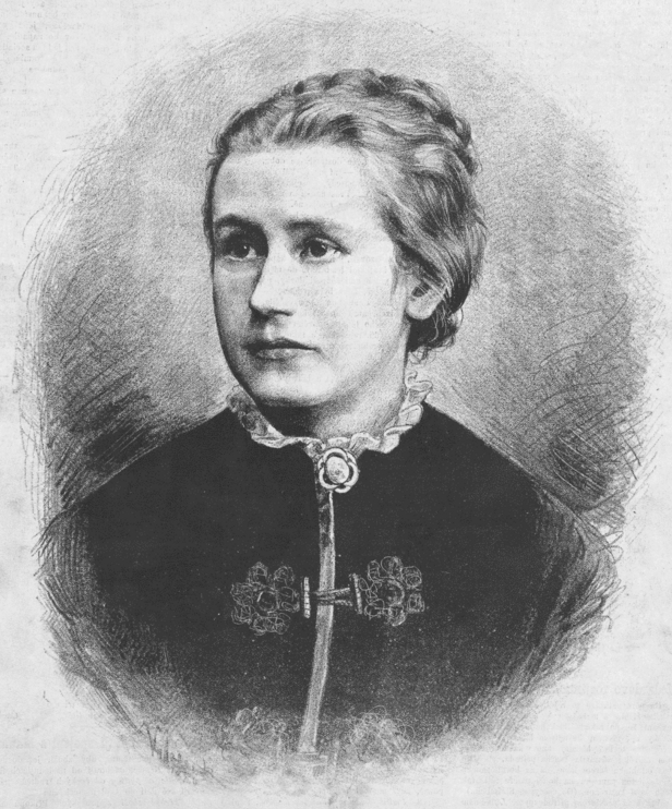 Portrét, nakreslený Janem Vilímkem pro Humoristické listy